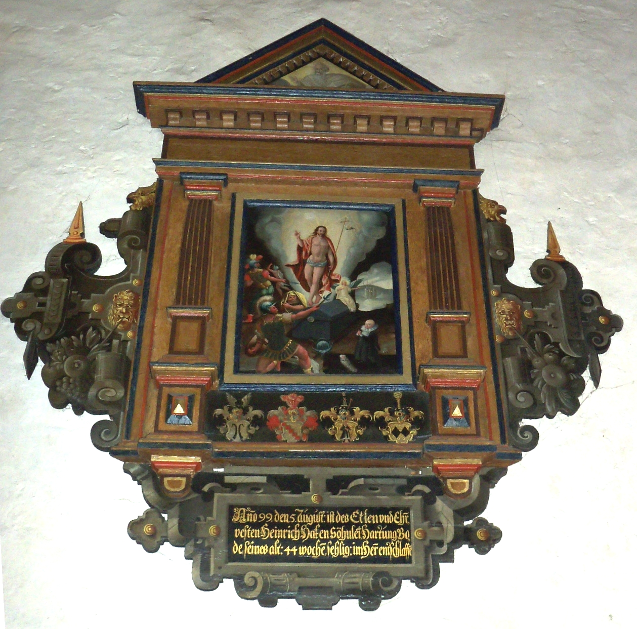 Evangelische Kirche St. Laurentius in Dassel, Niedersachsen, Deutschland – Epitaph des Hartung Bode von Hake von 1599